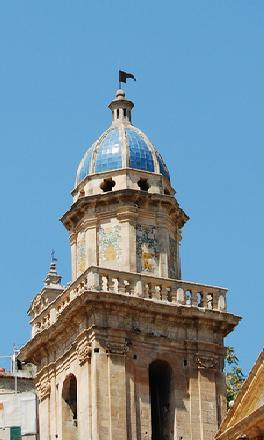 Chiesa di Santa Maria dell'Itria (Ragusa Ibla)